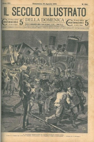 Il disastro ferroviario di Castel Giubileo presso Roma (Il Secolo Illustrato della Domenica, XII, 26 Agosto 1900, n. 554)